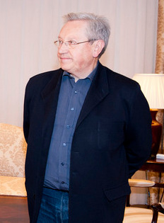 El coordinador de Aralar, Patxi Zabaleta, reunido con el lehendakari Patxi López, con motivo de la ronda de partidos para analizar la situación tras el último comunicado de ETA (26 de octubre de 2011).